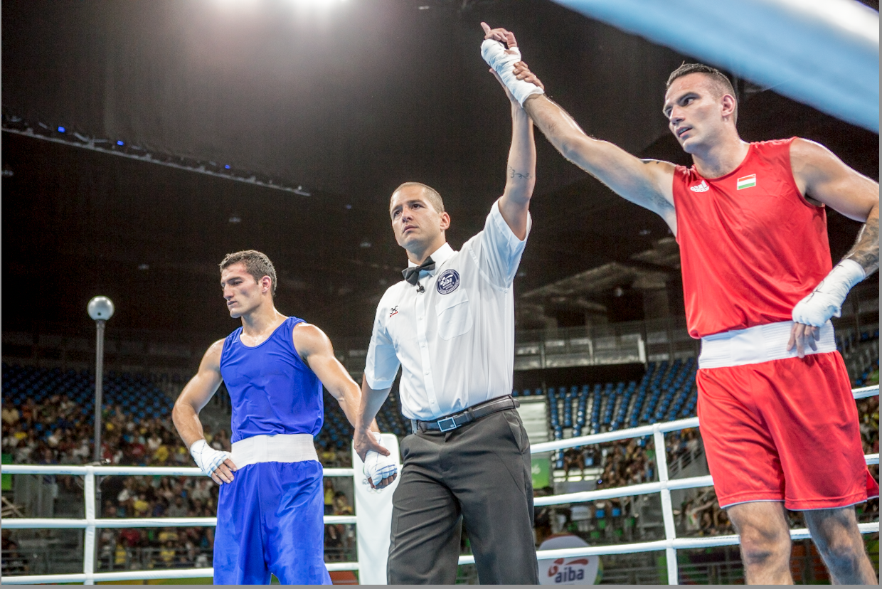 Day 3